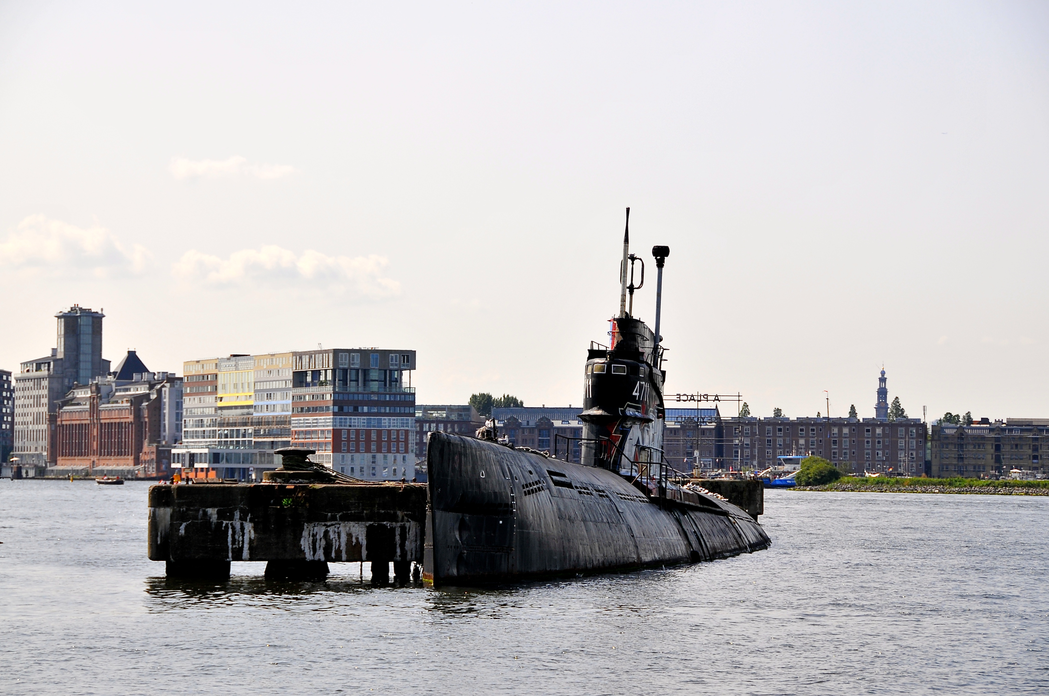 De B80, een 90m lang schip uit de Zulu klasse, werd in 1956 in Riga gebouwd, het is dus een Russische onderzeeboot (Zulu is de NAVO naam). Het schip is eigendom van een Turkse firma. Zeer binnenkort wordt de boot naar Spanje gesleept waar hij wordt gesloopt. Onderdelen zullen in een museum in La Coruna te zien zijn.